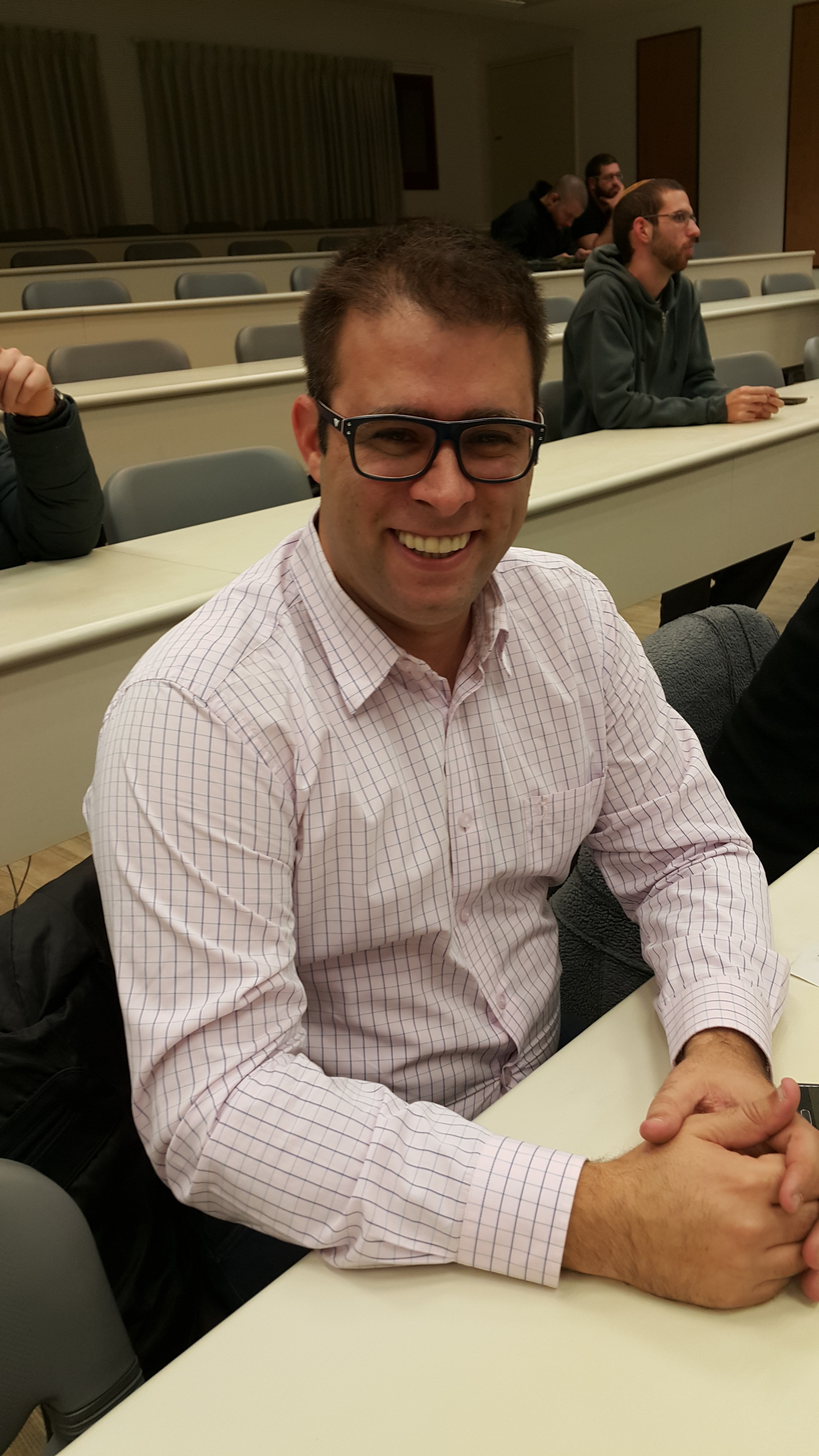 אורן חזן